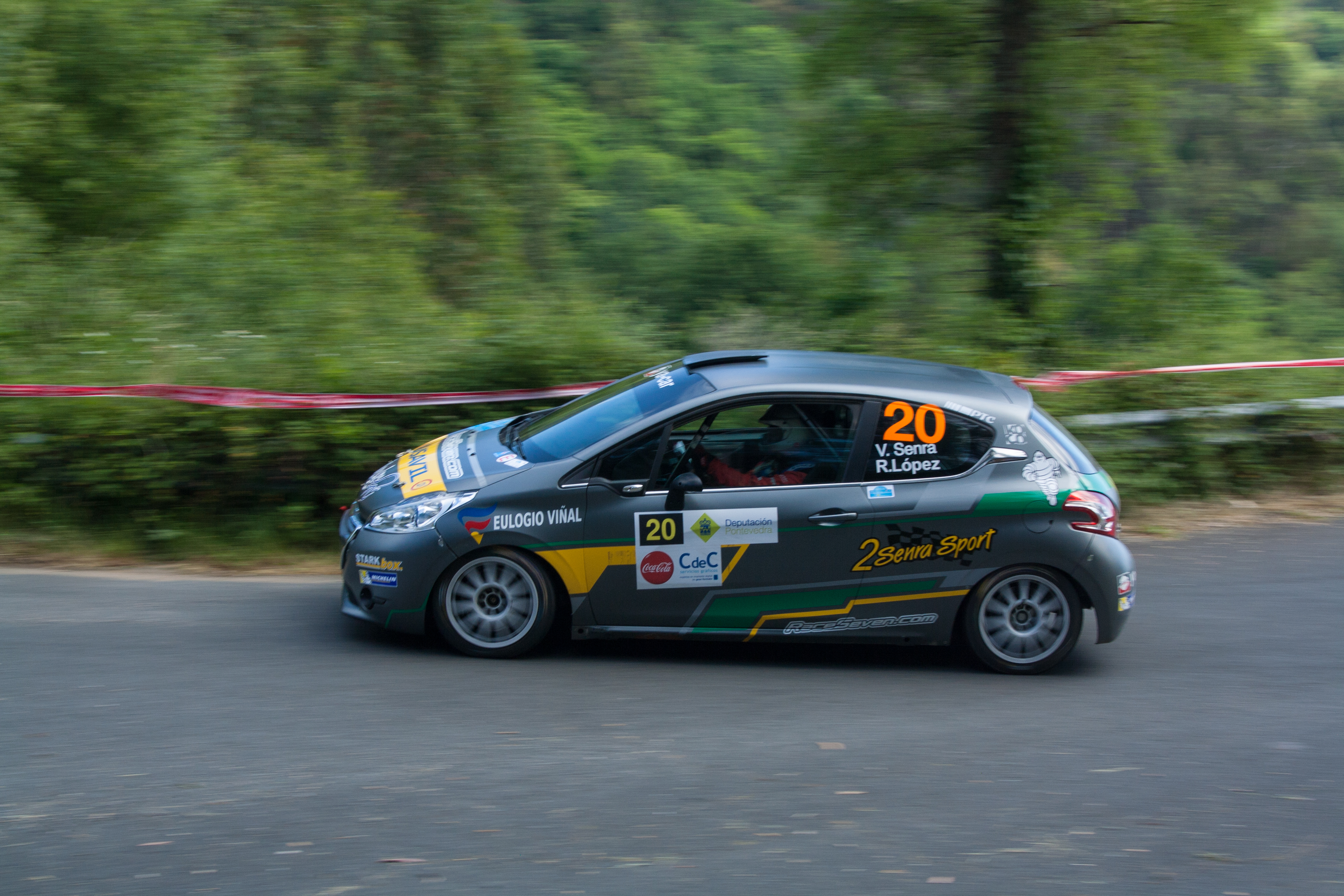 VICTOR SENRA RAMON LOPEZ